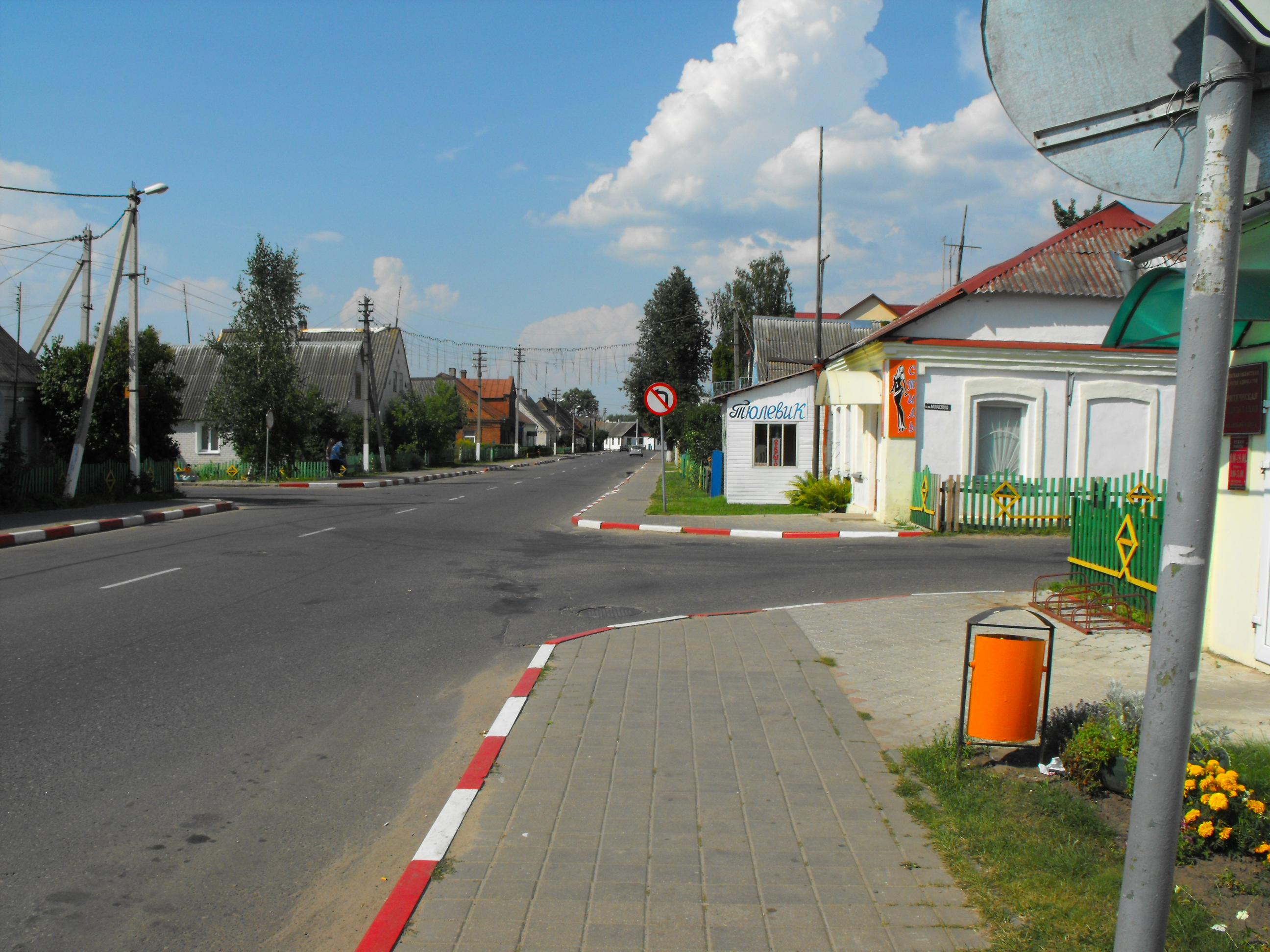 Поставы, улица Ленинская (бывшая Браславская), по правую сторону которой во время Второй мировой войны находилось Поставское гетто, ограниченное с другой стороны улицей Горького.